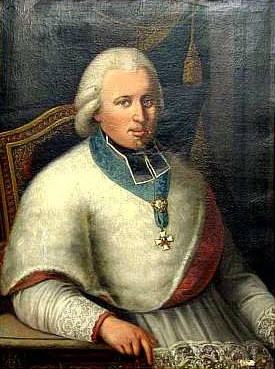 Johann Baptist Aloysius Graf von Edling, Domherr in Lübeck, Pfarrer von Vierkirchen 1780-1793